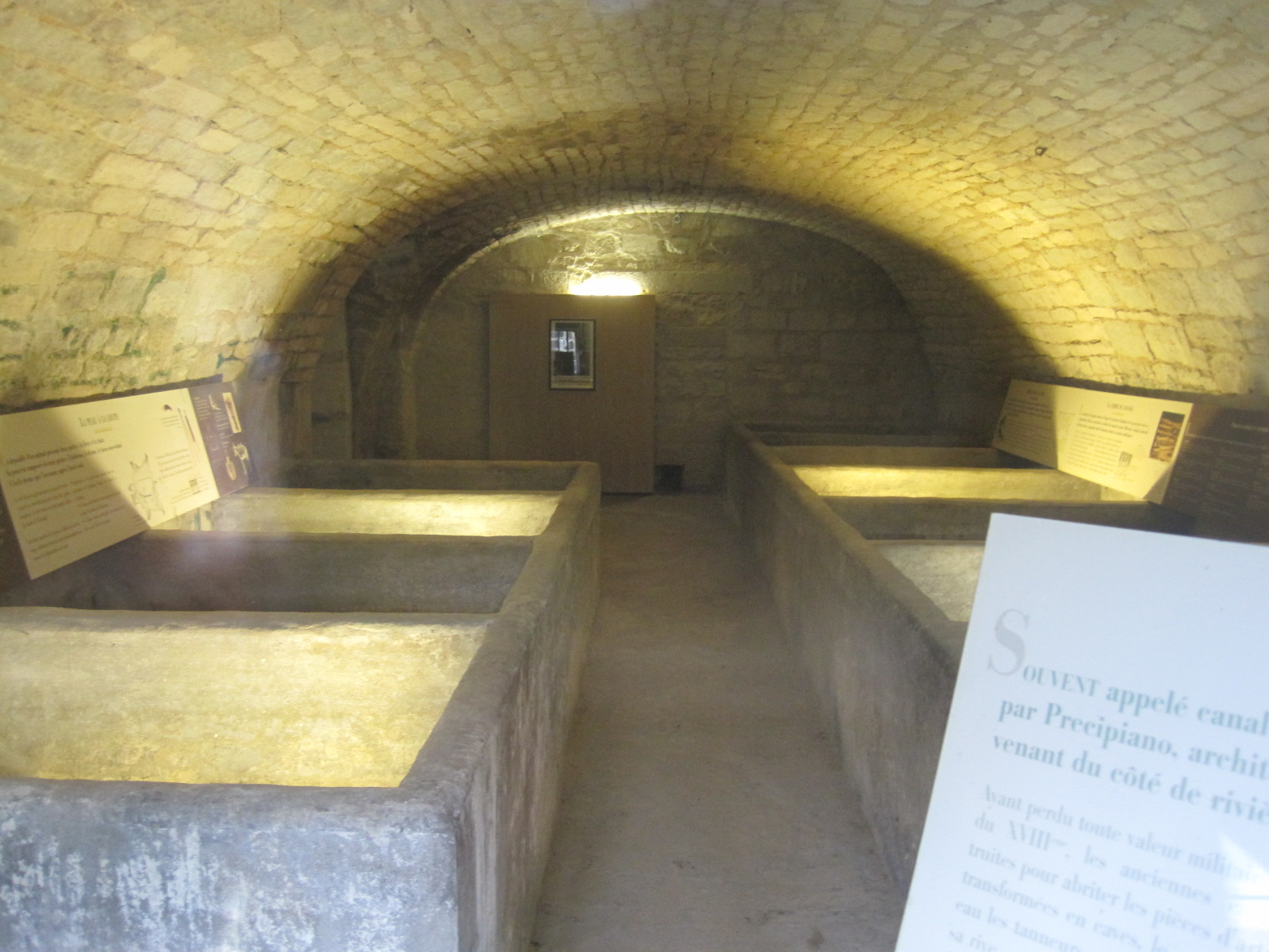 House of Pasteur in Dole - Ancienne tannerie de Jean-Joseph Pasteur